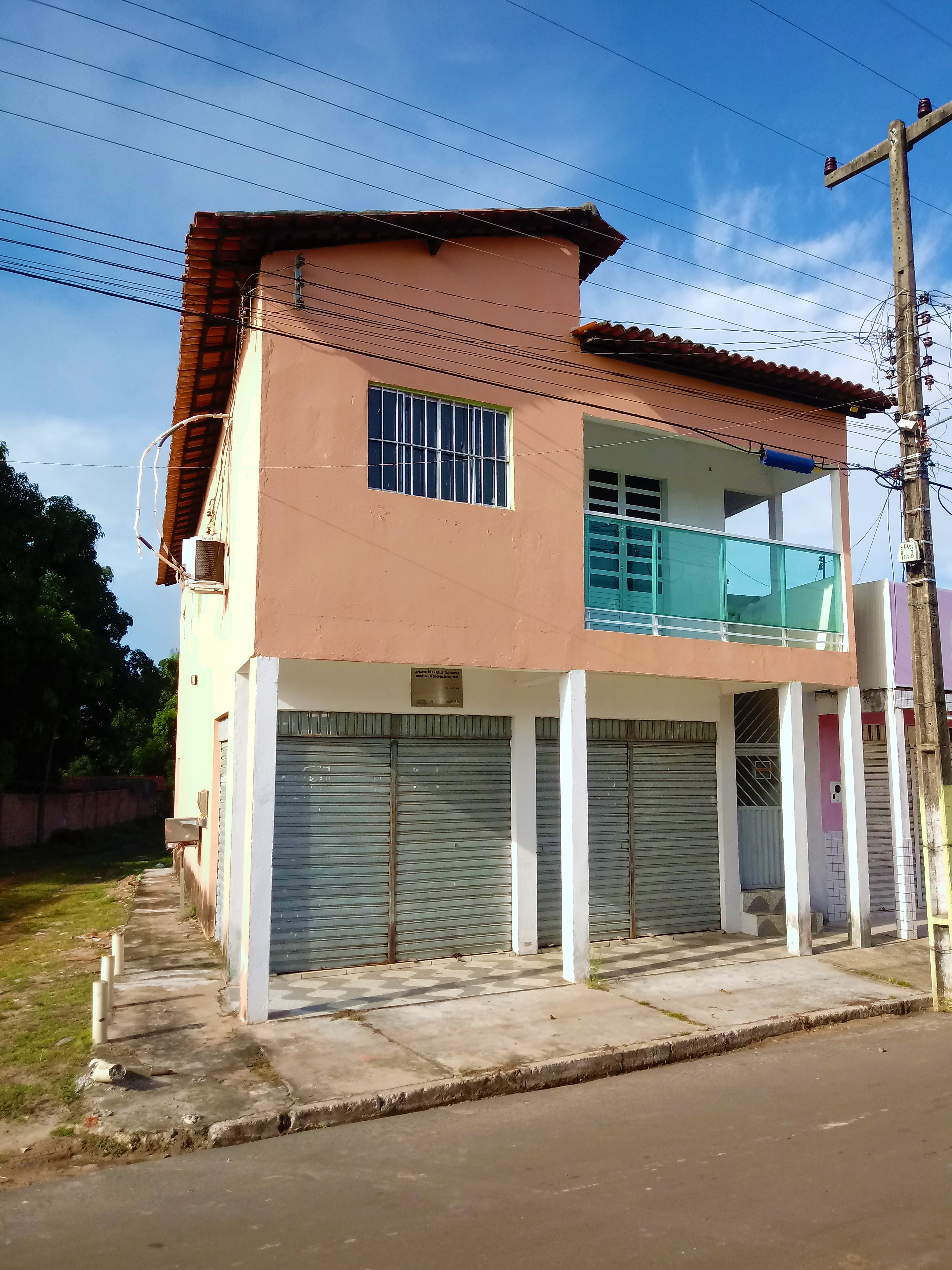 Prédio da Biblioteca Municipal de Boqueirão do Piauí em junho de 2020.